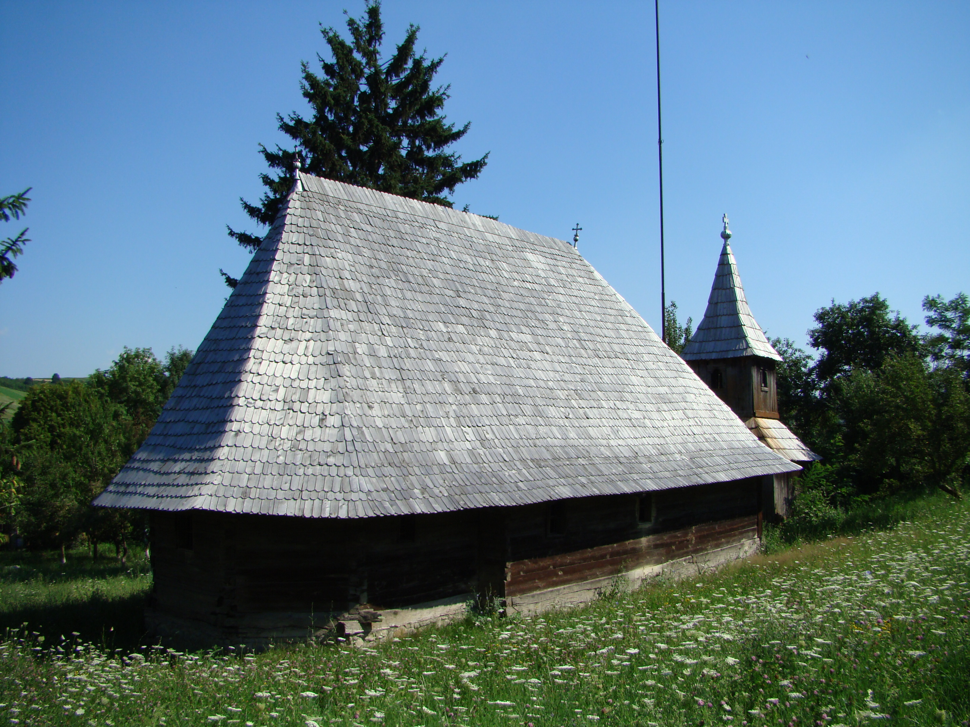 Biserica de lemn din Sărmășel-Gară 01